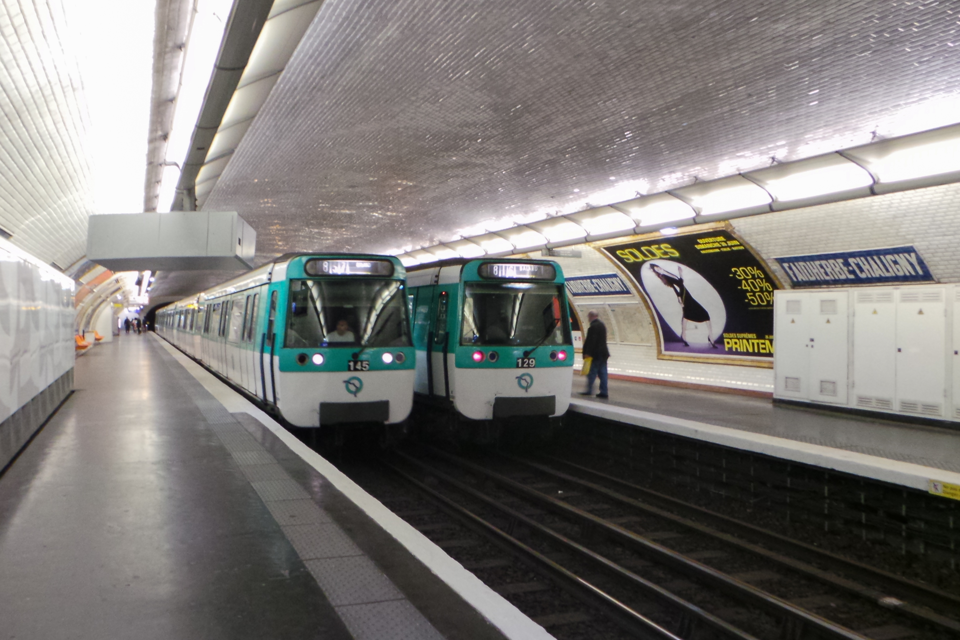 Station de métro Faidherbe - Chaligny, métro de Paris ligne 8, Paris, France